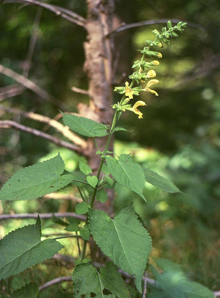 Kleb-Salbei (Salvia glutinosa), Lippenblütler (Lamiaceae) - Österreich/Austria/Autriche: Niederösterreich, Erlauftal E Gaming, Vordere Tormäuer, Toter Mann